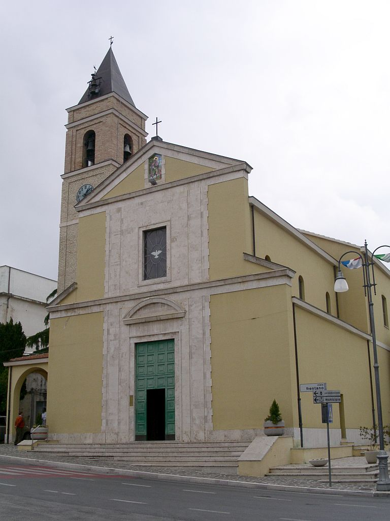 Chiesa di San Rocco. Mozzagrogna (CH), 3 giugno 2007. Foto scattata da me.